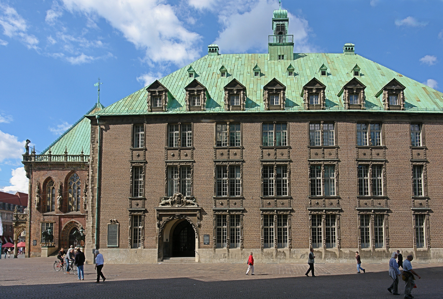 Das Neue Rathaus in Bremen. Seite Domshof Das abgebildete Objekt ist ein geschütztes Kulturdenkmal in der Freien Hansestadt Bremen, mit der Nr. 0066,T003 beim Landesamt für Denkmalpflege registriert.